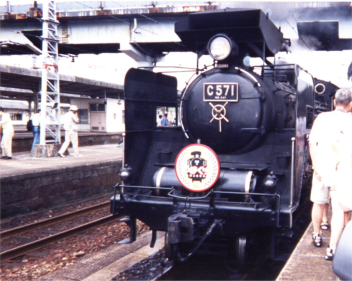 SLやまぐち号20周年記念列車